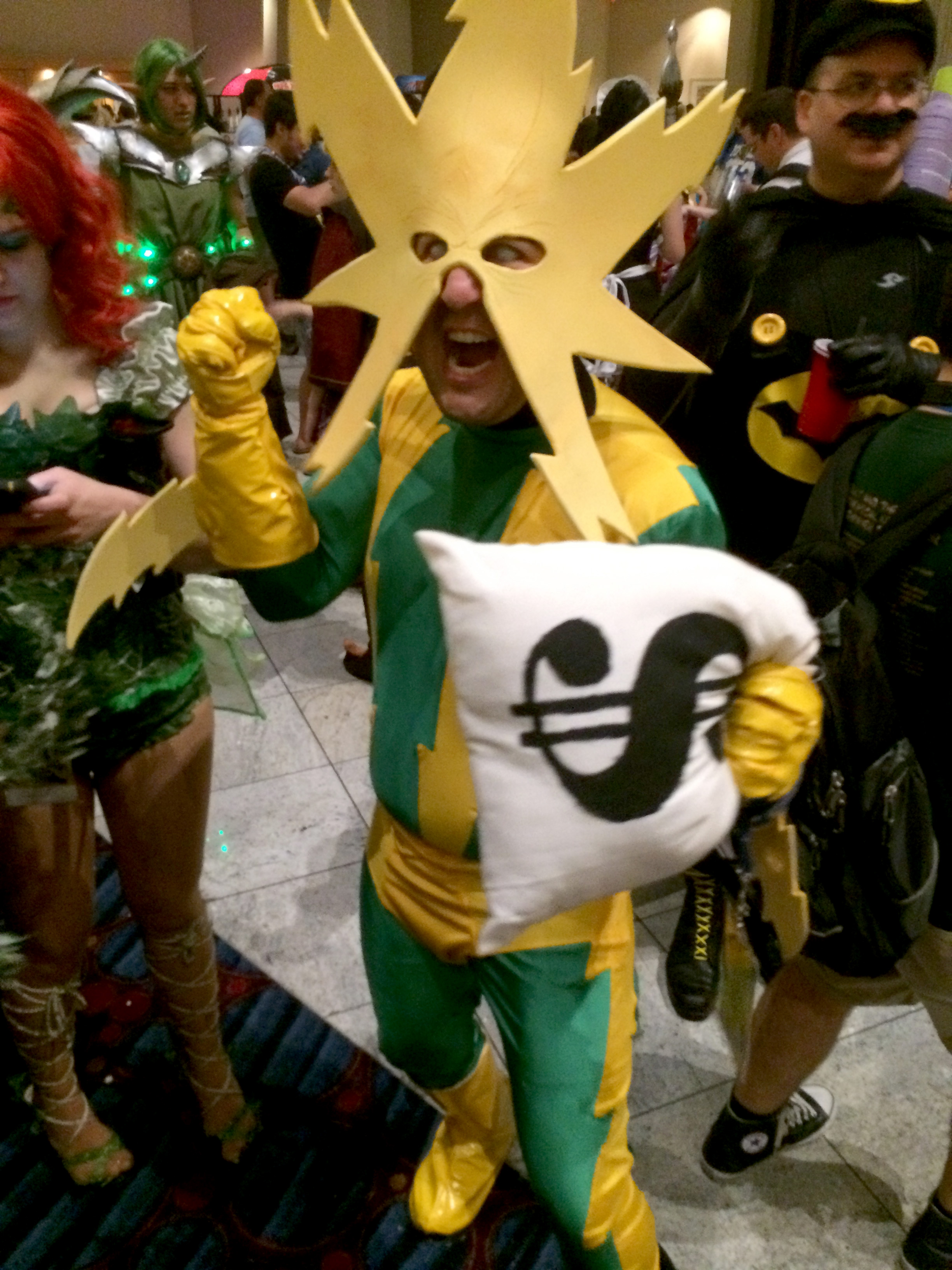 Cosplay at Dragon Con 2014.